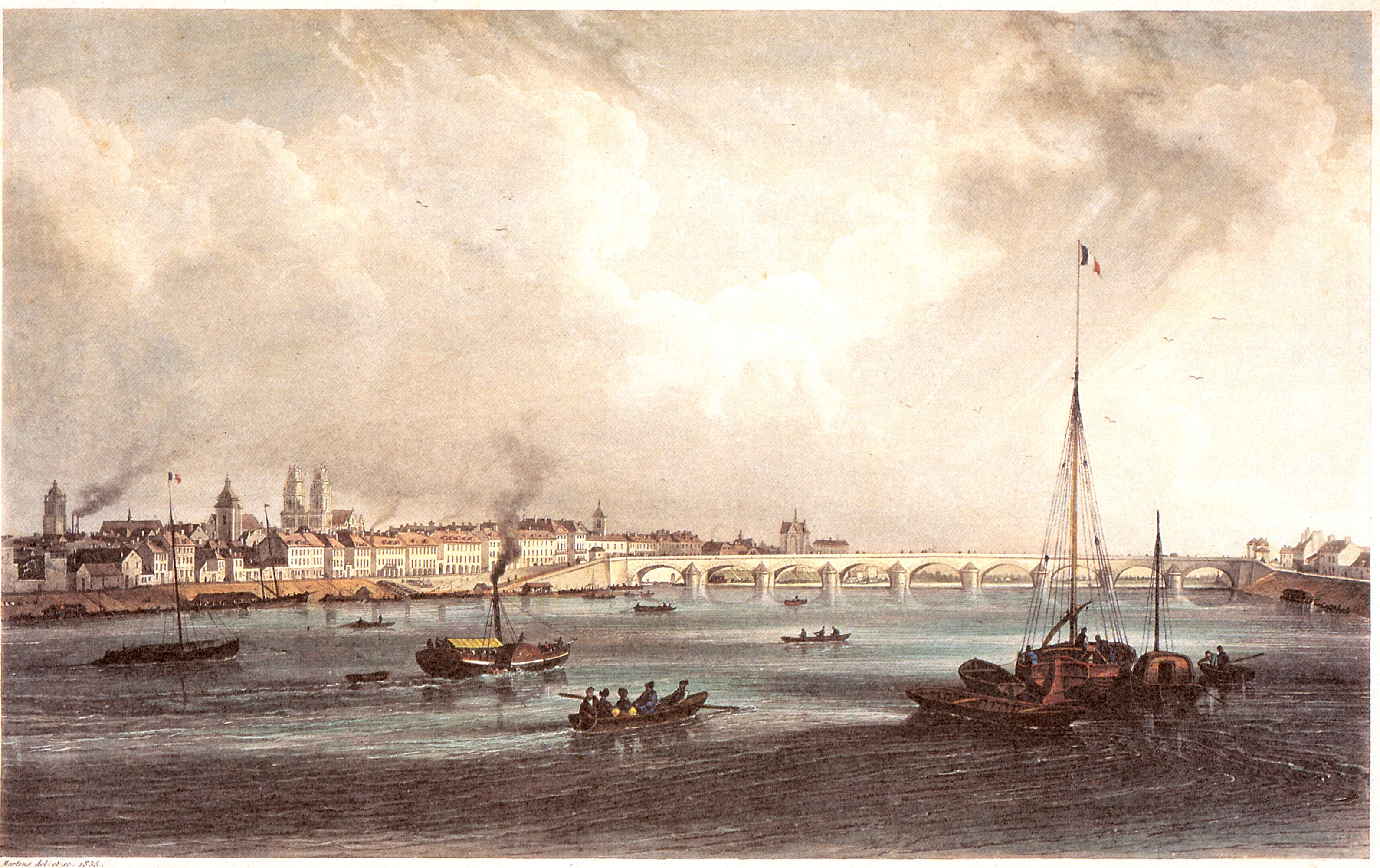 Pont Royal, vue aval en 1835, Orléans, Loiret, France